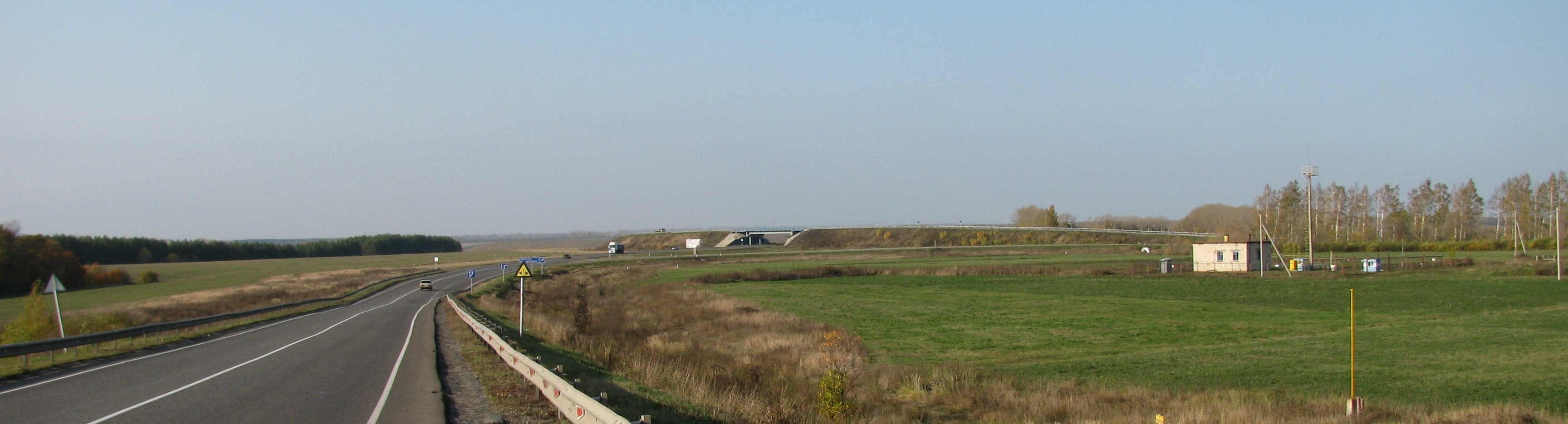 Трасса М7 - развязка у Тюрлемы